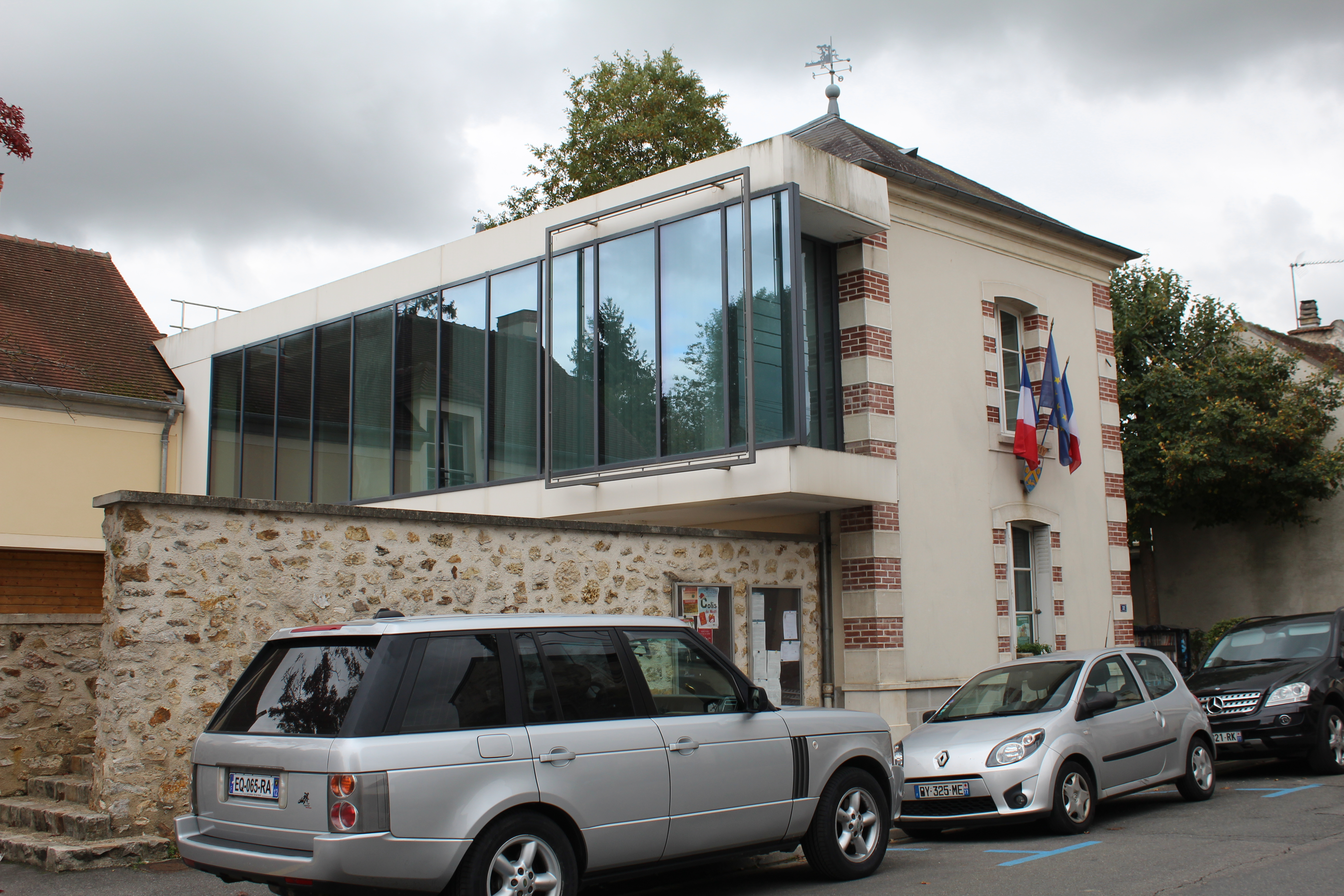 Mairie de Chessy, Seine-et-Marne.